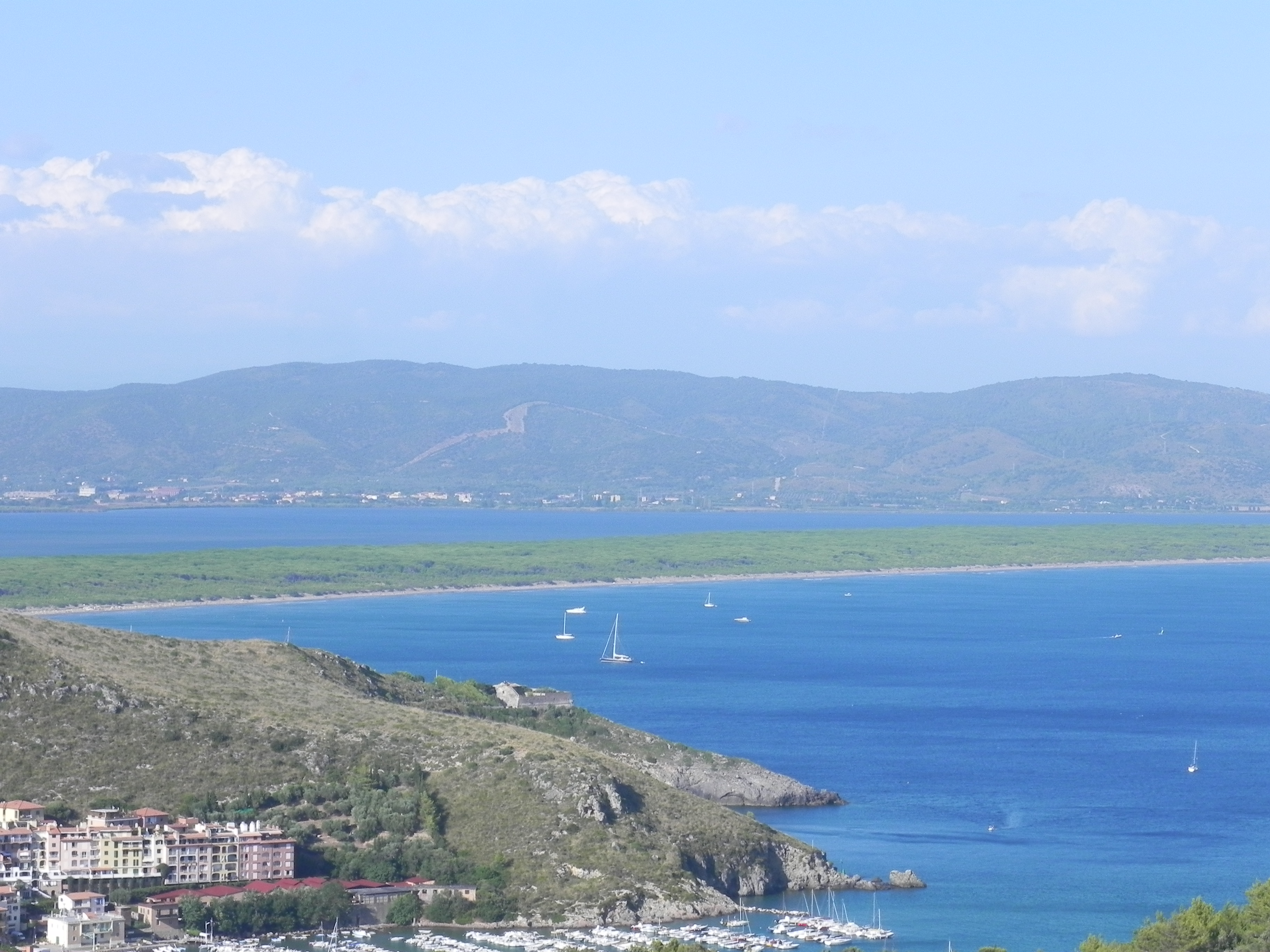 Tombolo di Feniglia visto da Forte Stella sul Monte Argentario. In primo piano in basso Porto Ercole.